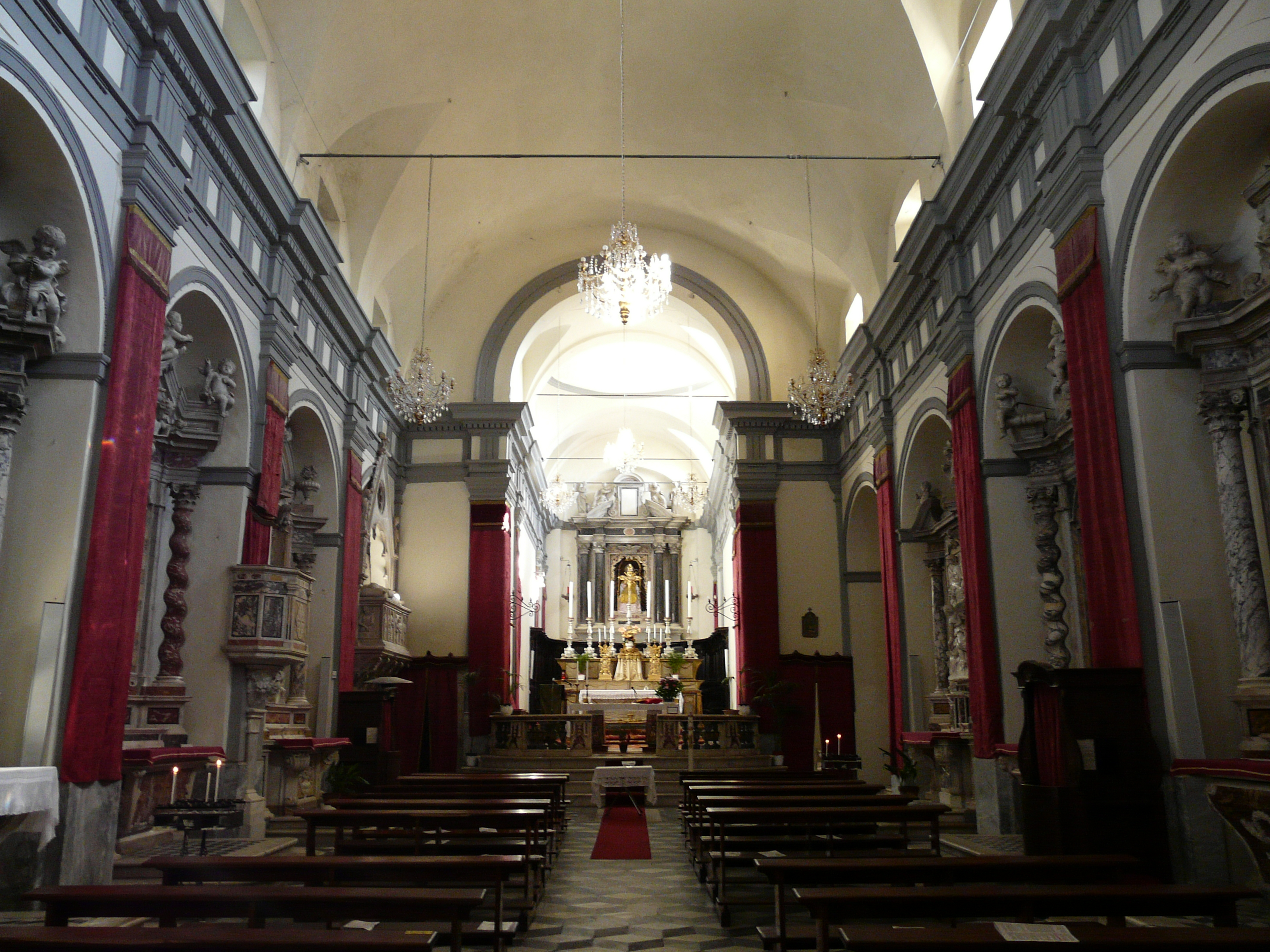 Chiesa-Santuario di San Remigio, Fosdinovo, Toscana, Italia